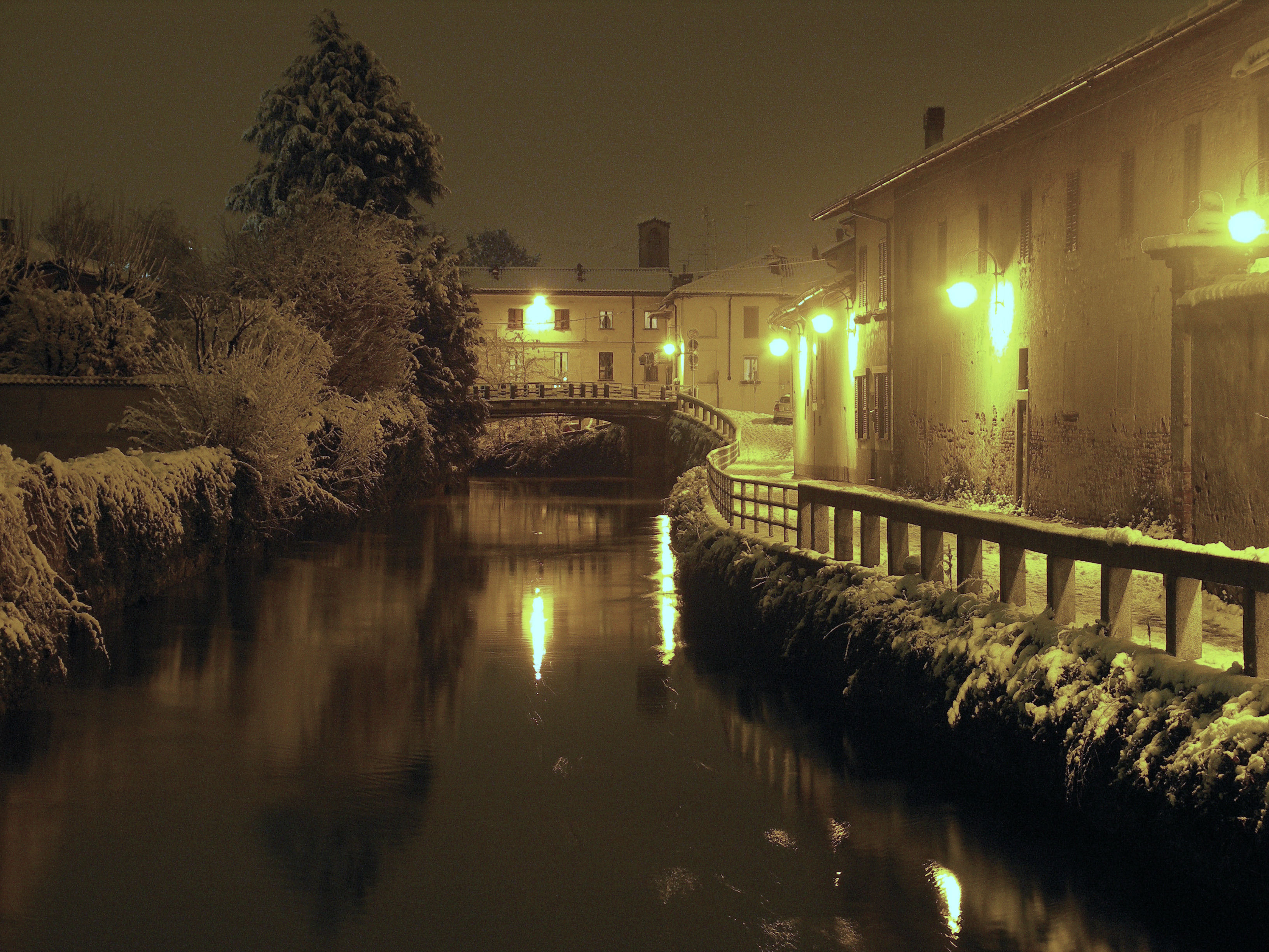 Fotografia notturna del naviglio Martesana, canale che attraversa Gorgonzola. Foto personale. Gorgonzola, dicembre 2005.